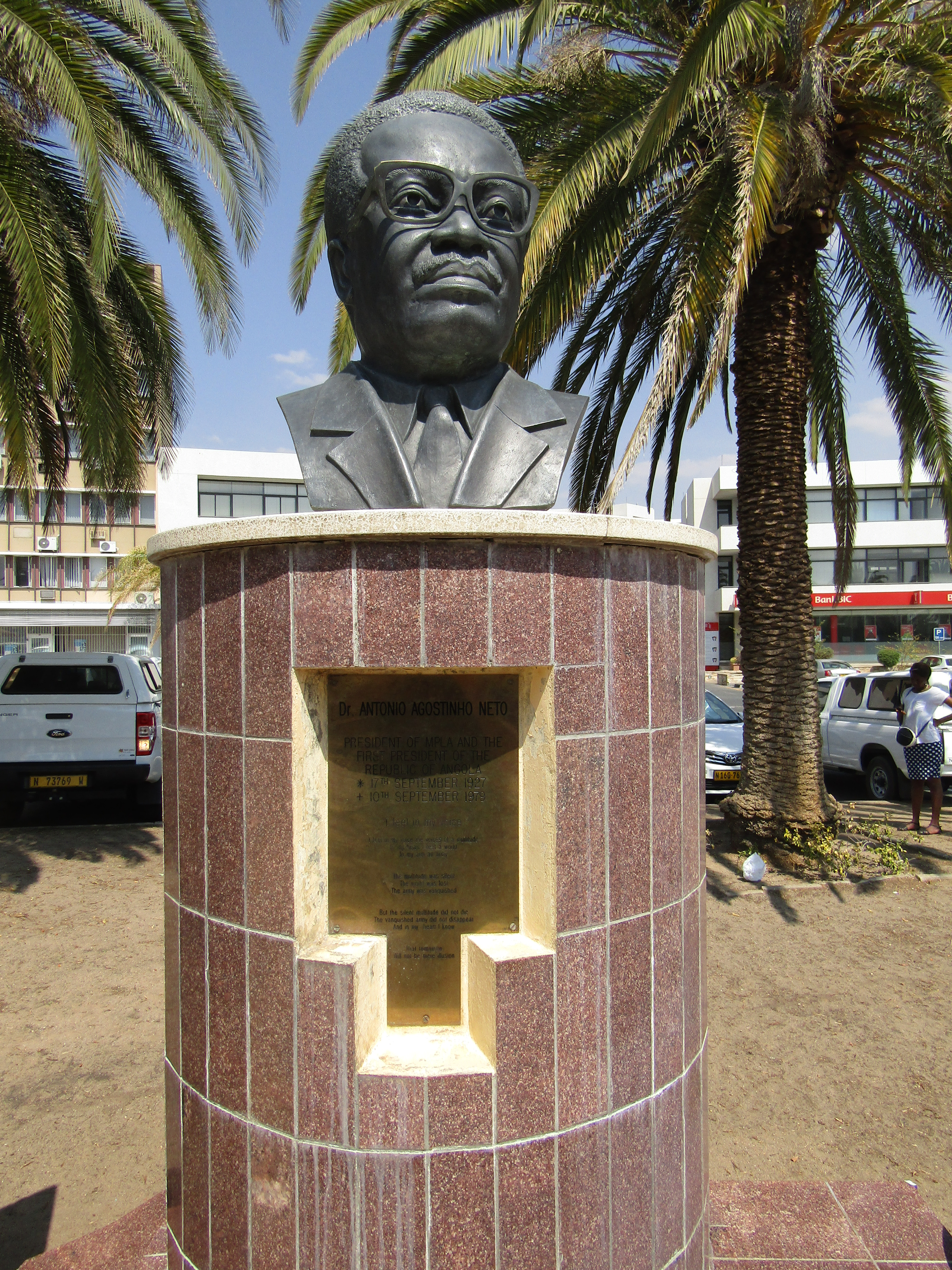 Denkmal am Ausspannplatz in Windhoek zur Erinnerung an Dr. Antonio Agostinho Neto